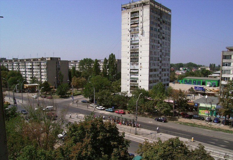 Sos. Giurgiului